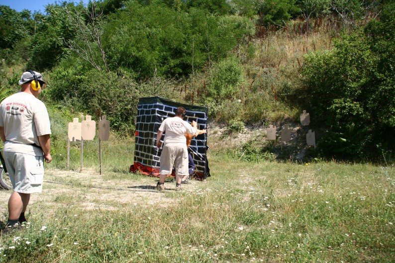 IDPA verseny (Bel SE rendezésében)